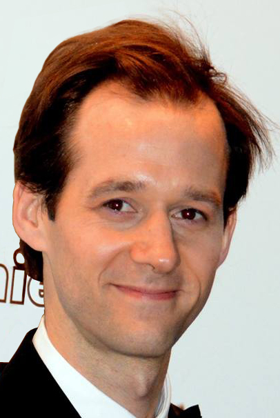 Benjamin Lavernhe à la cérémonie des César du cinéma